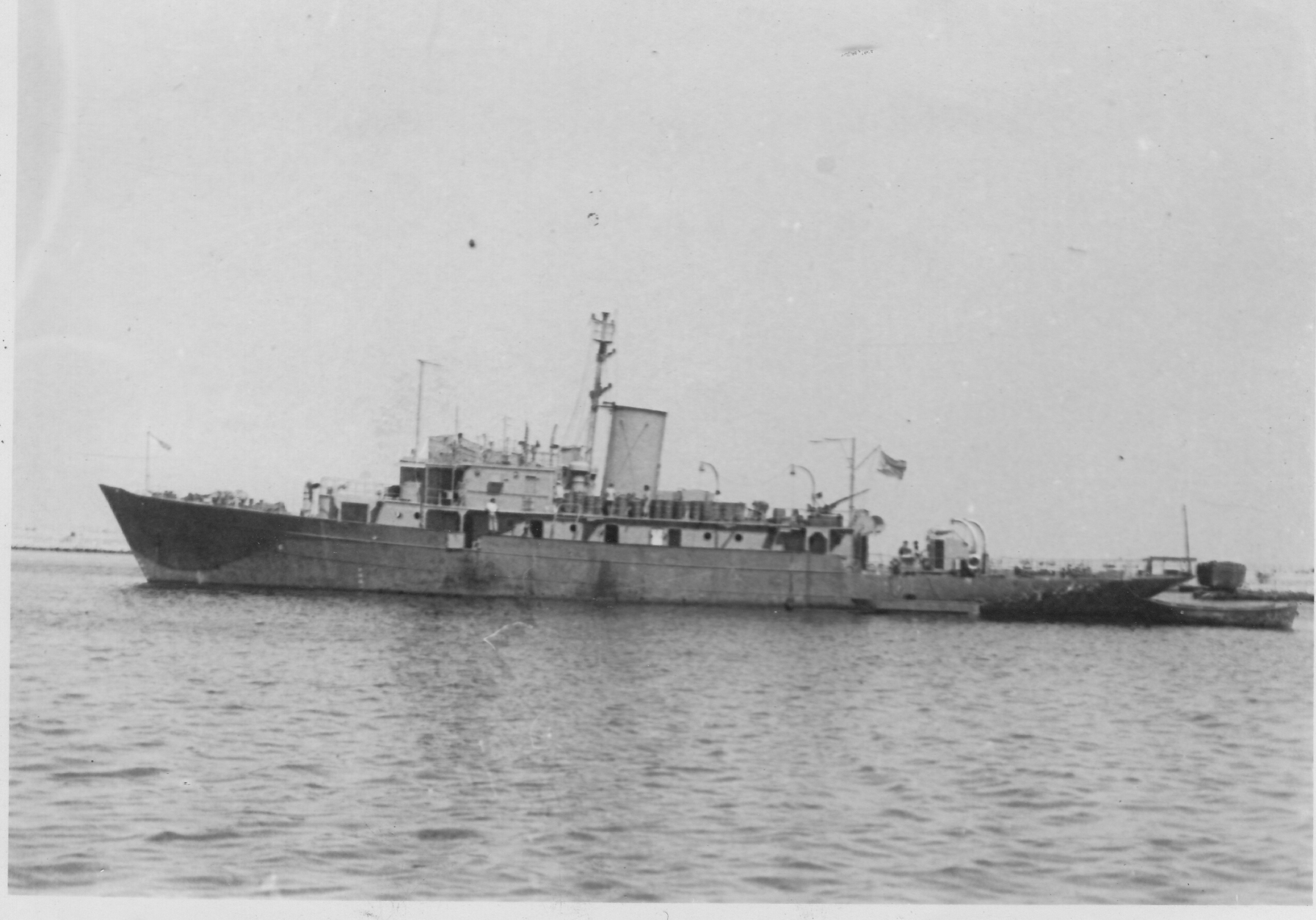 אח"י מעוז (ק-24)